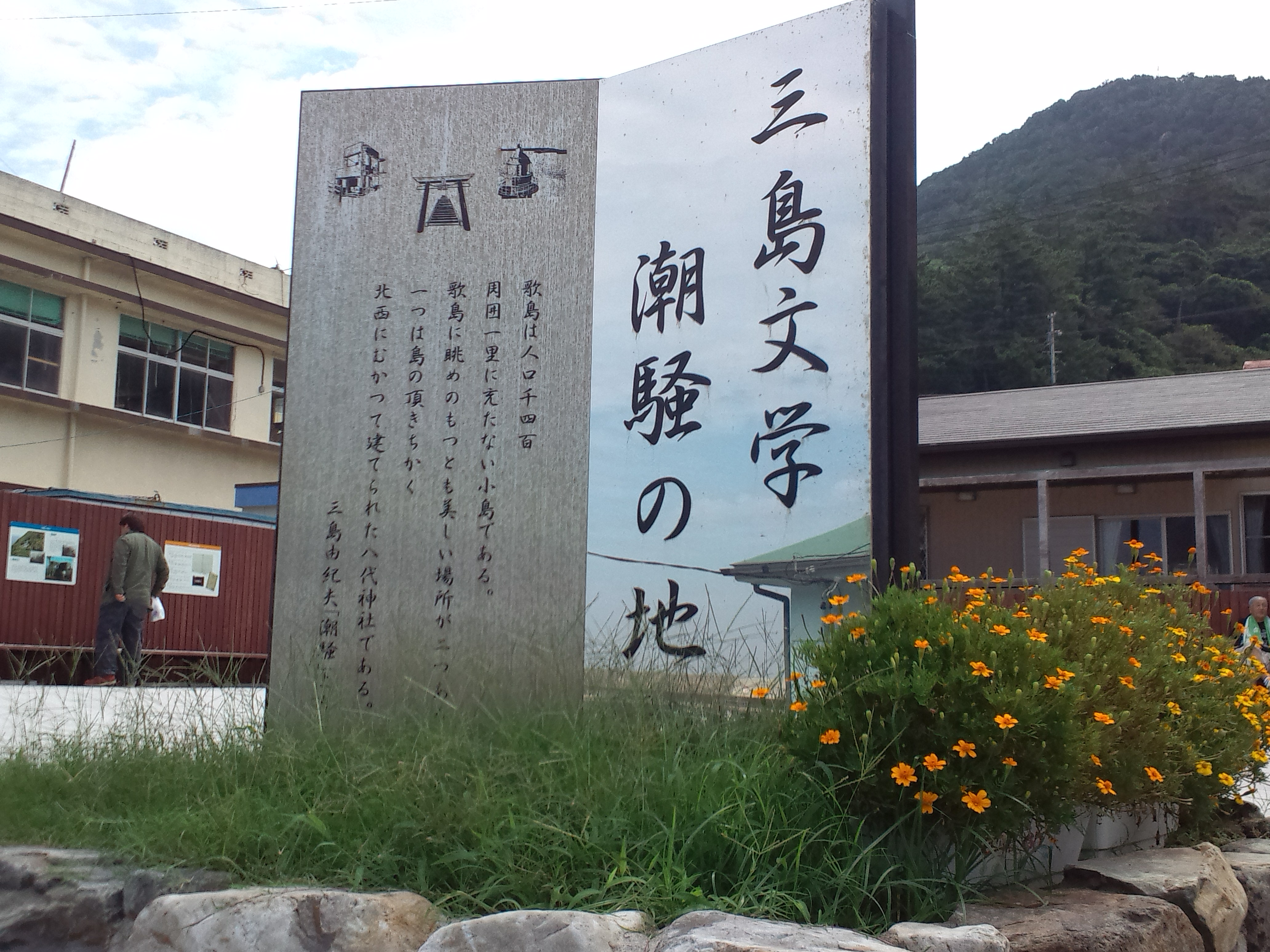 神島（三重県） 三島由紀夫の作品「潮騒」のモニュメント